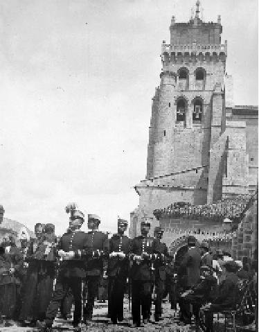 Festividad de El Curpillos. Monasterio de las Huelgas, Burgos, W España Finales siglo XIX.